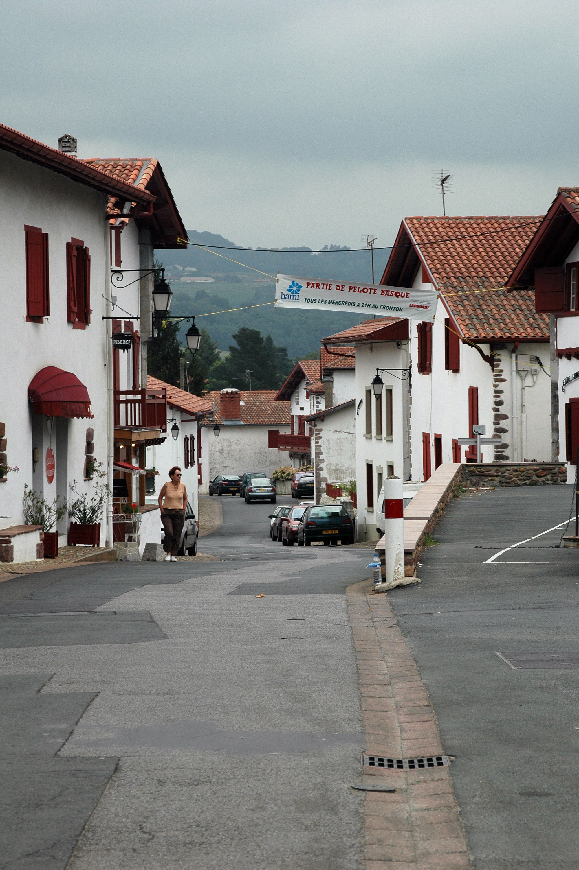 Itxassou, rue principale. Photo prise le 27/07/06 par Harrieta171